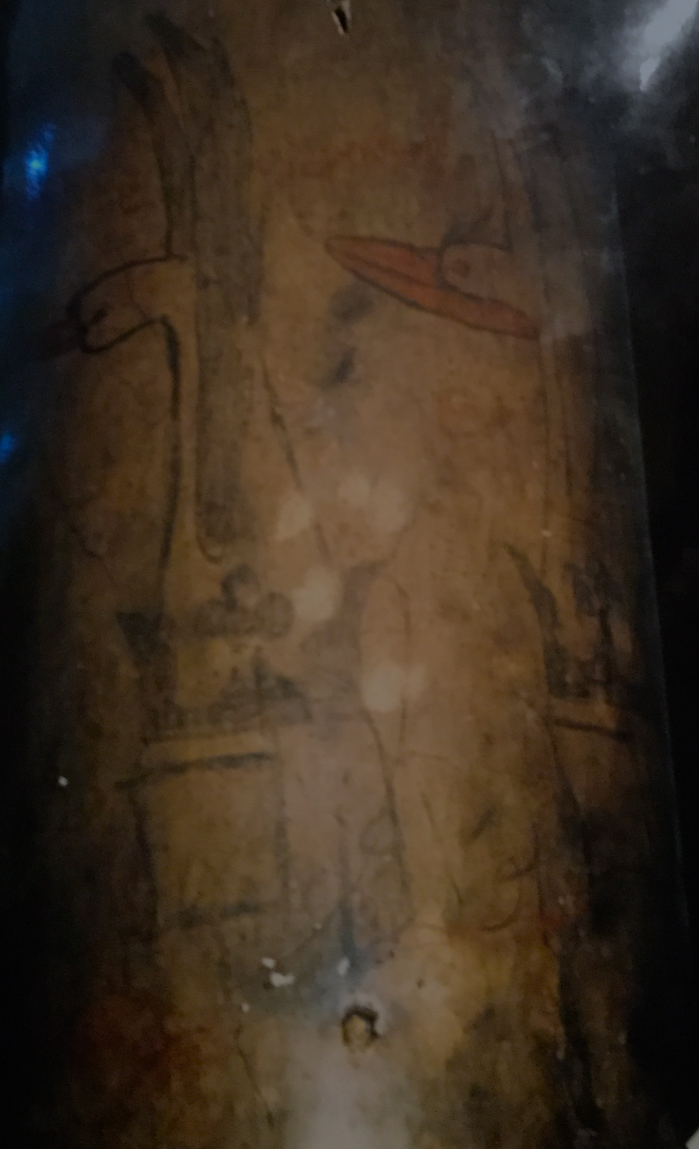 Fragmentale Malerei.... Ritter vermutlich Mitte 12.Jhd. Die Malerei befindet sich auf einer Säule in der Geburtskirche in Betlehem, ähnliche fragmentale Reste von Rittermalerei (Templer?) befinden sich auch auf anderen Säulen der Basilika, etwa in Augenhöhe platziert